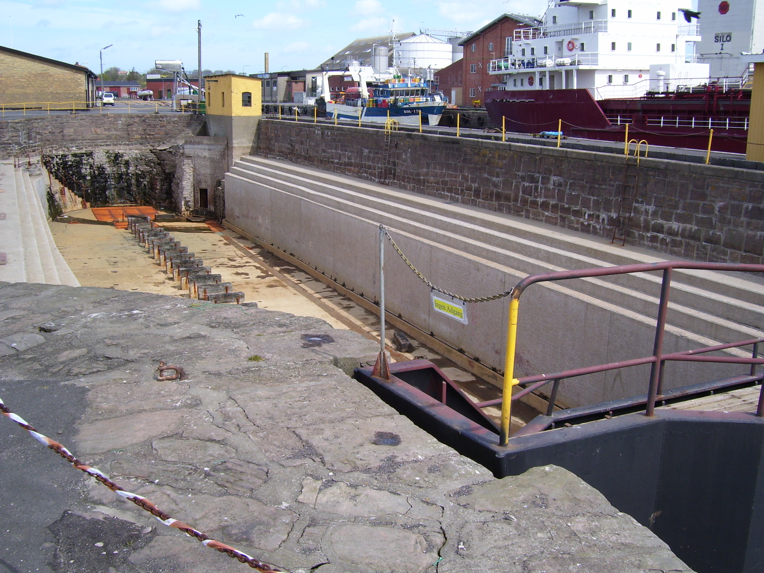 Nexo - suchy dok